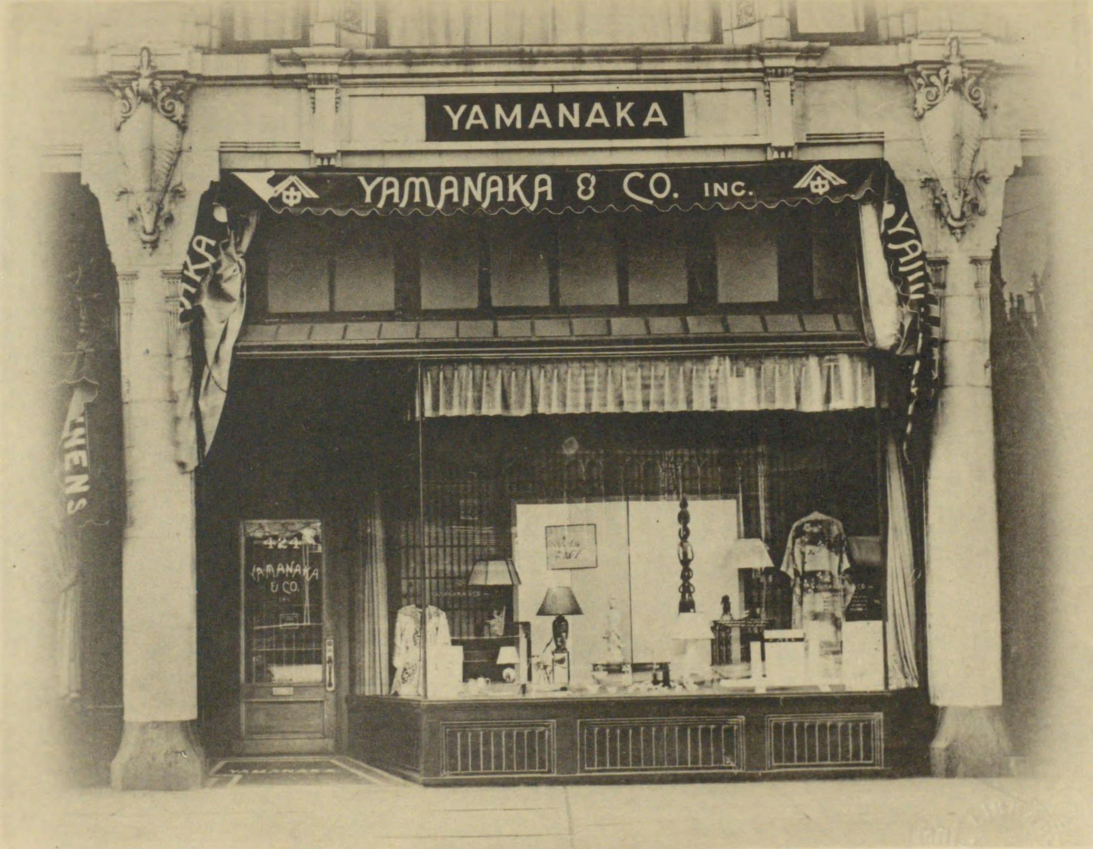 山中商会ボストン支店